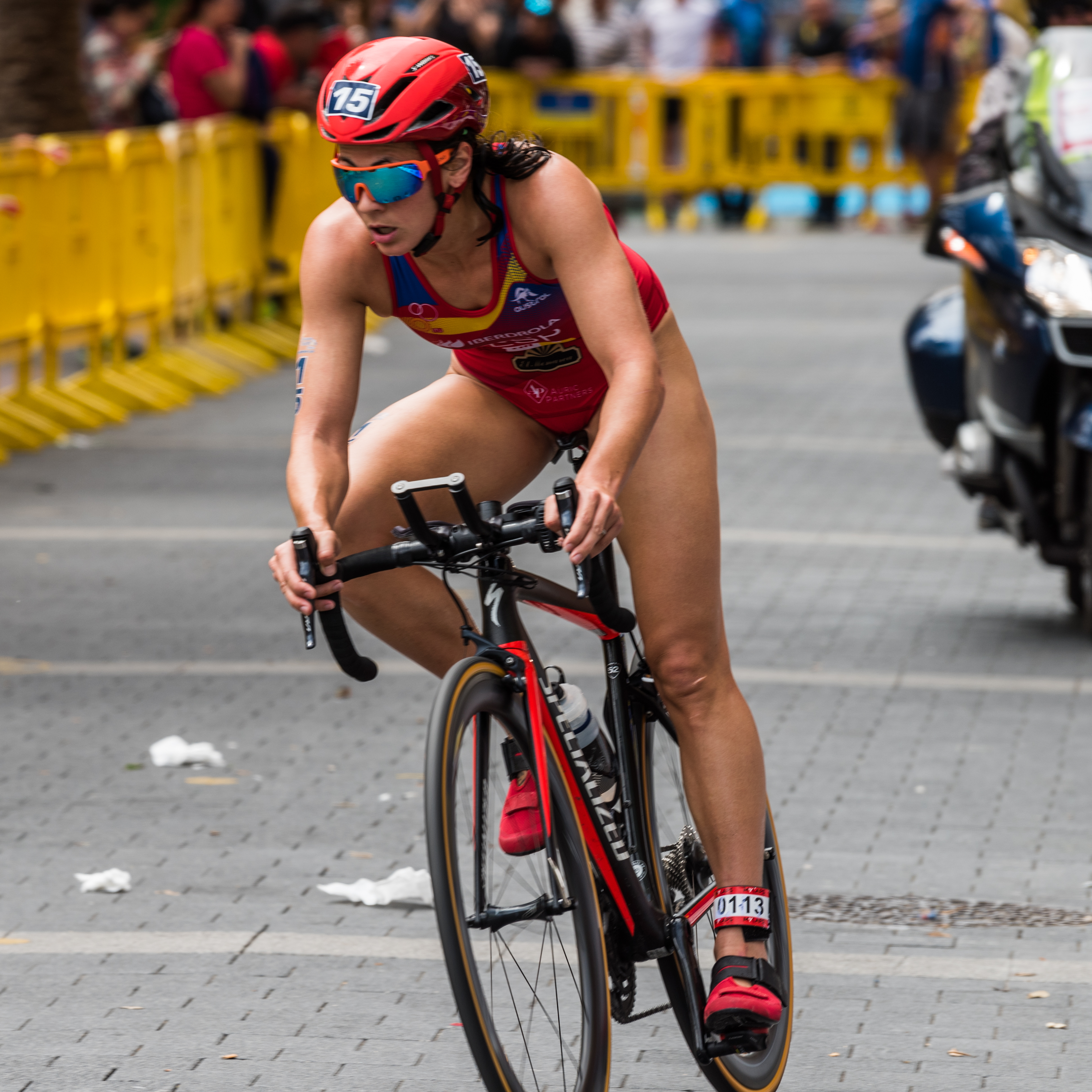 Sara Pérez Sala at 2018 Gran Canaria ETU Sprint Triathlon European Cup